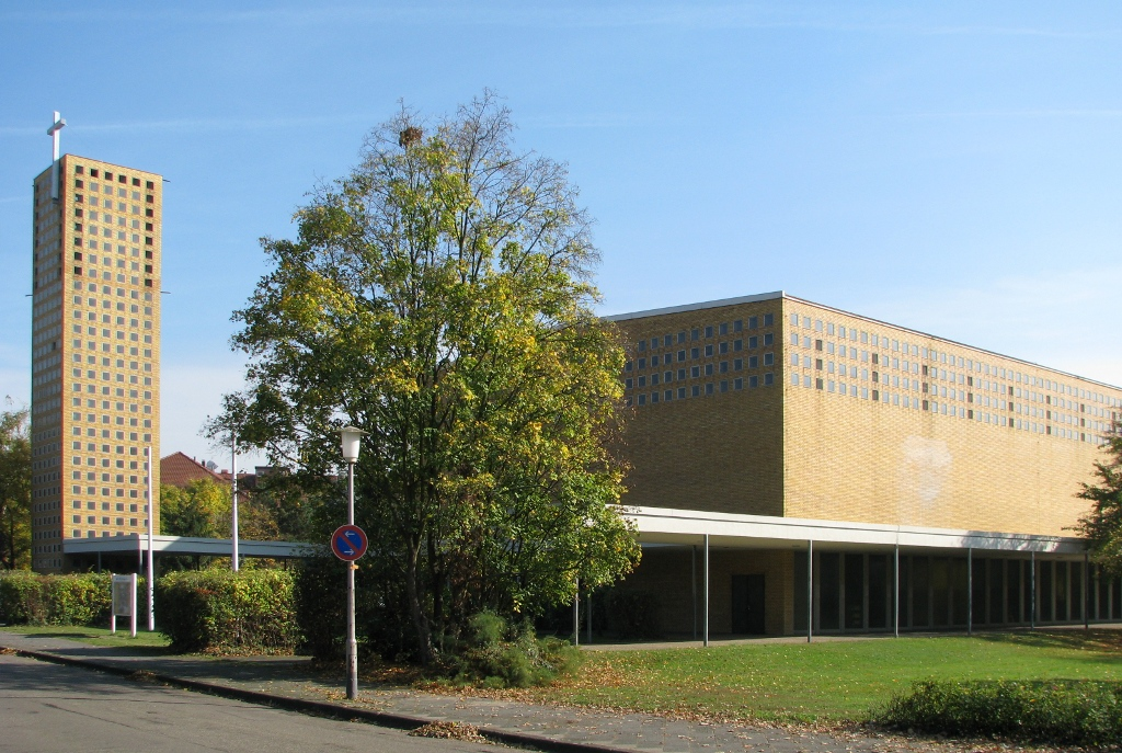 römisch-katholische Kirche St. Hildegard in Mannheim-Käfertal